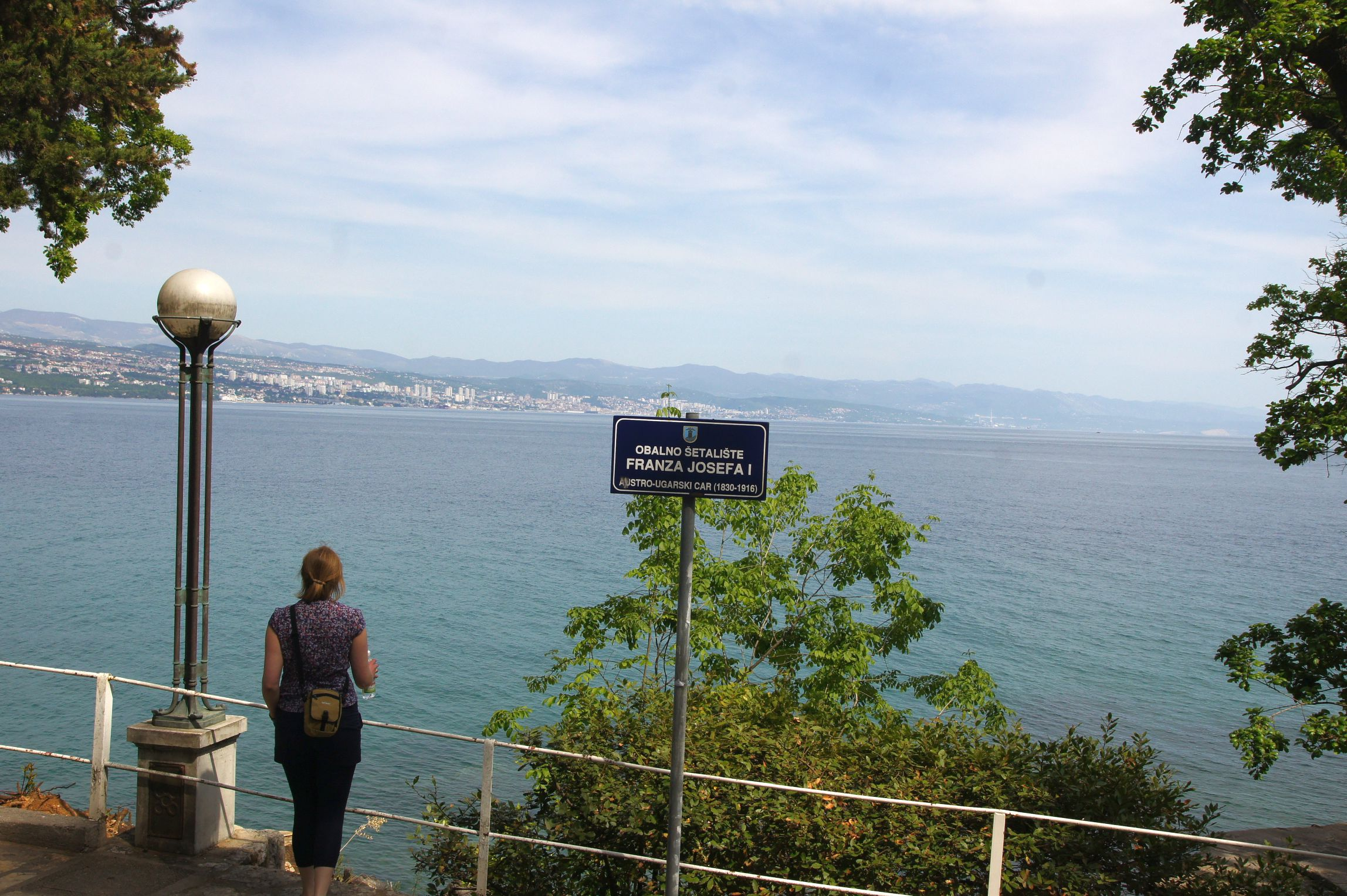 From Opatia to Rijeka